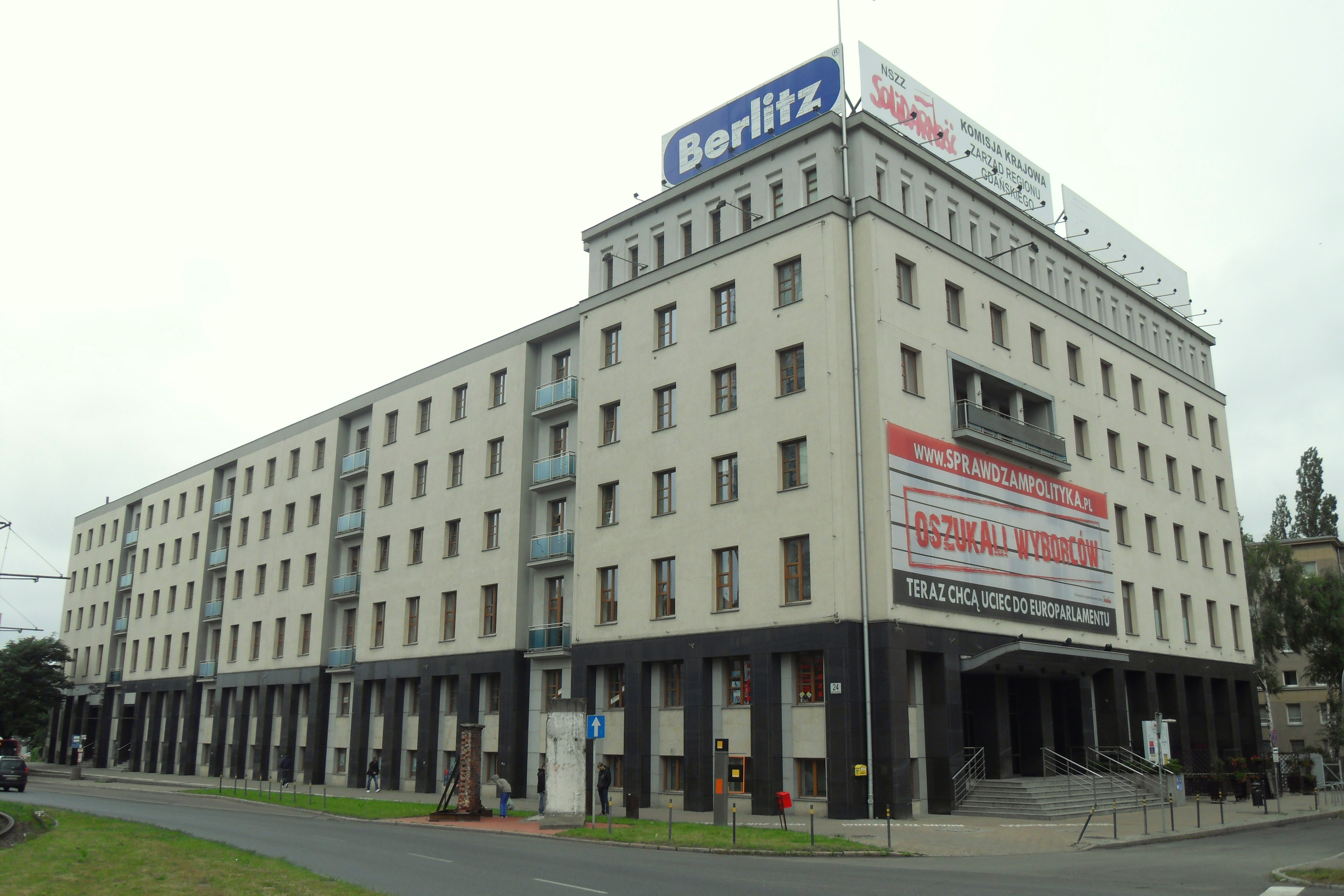 Gdańsk Śródmieście, ul. Wały Piastowskie 24.